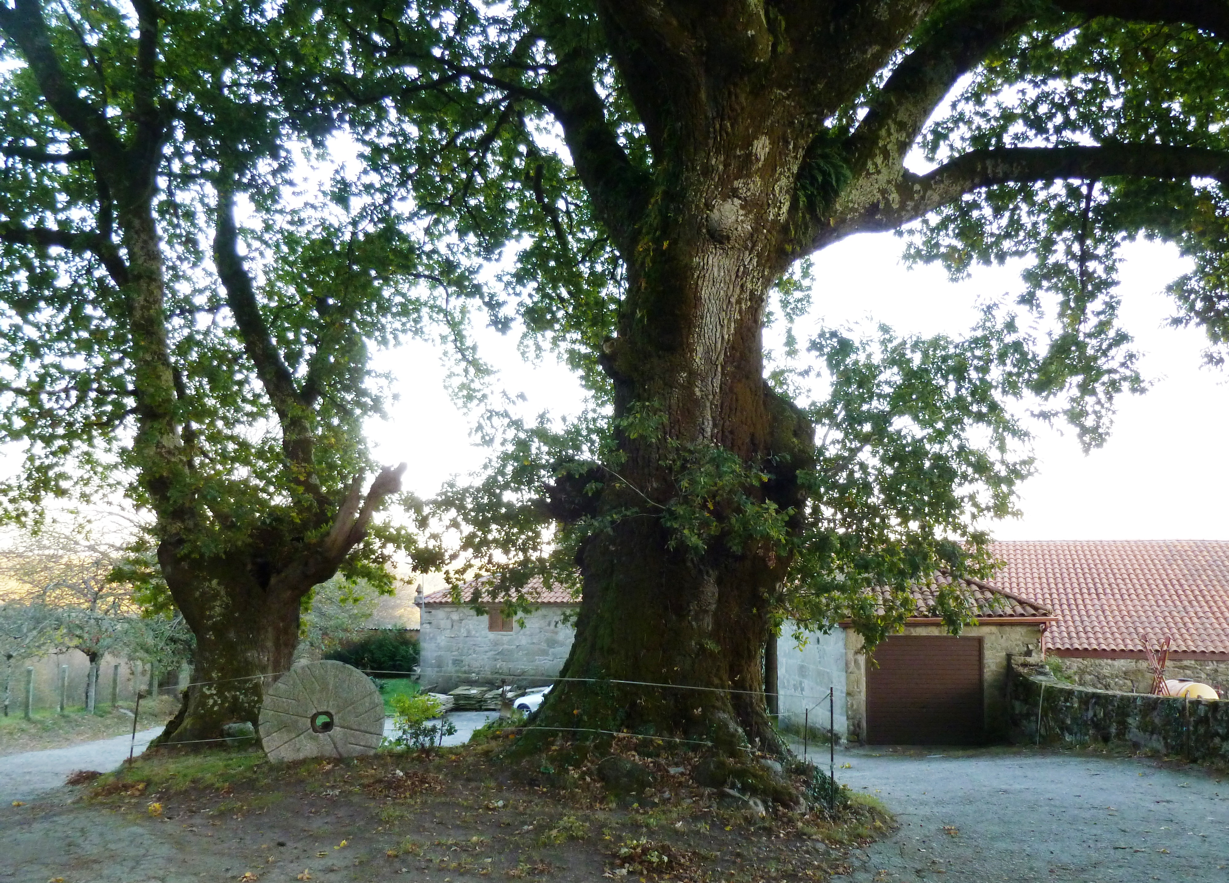 Carballo da Casa Grande de Buciños, Carballedo